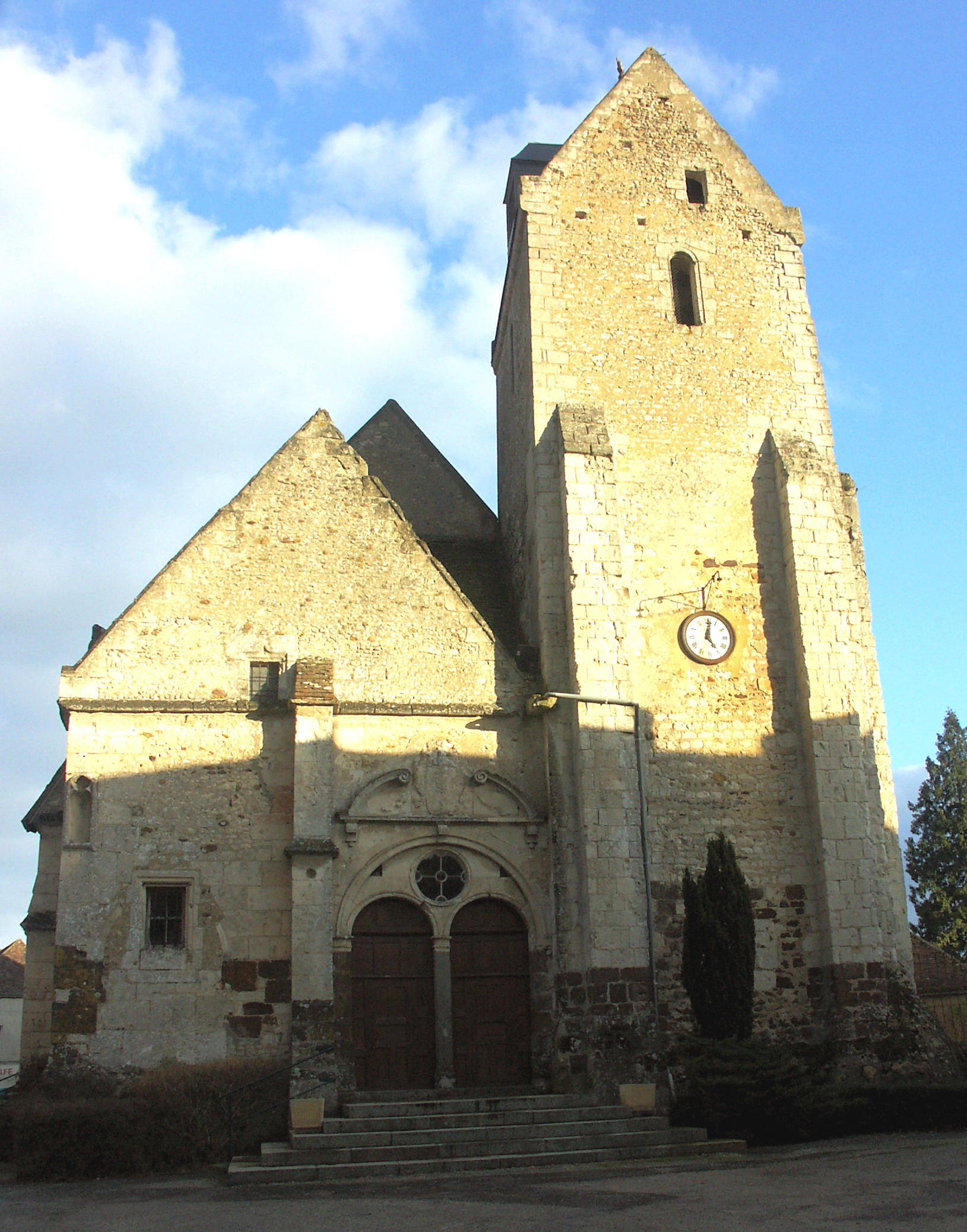 Avant-nef ajoutée au 15e s, portail début 18e s. Tour-clocher surélevée au 16e s. ISMH 1998. .